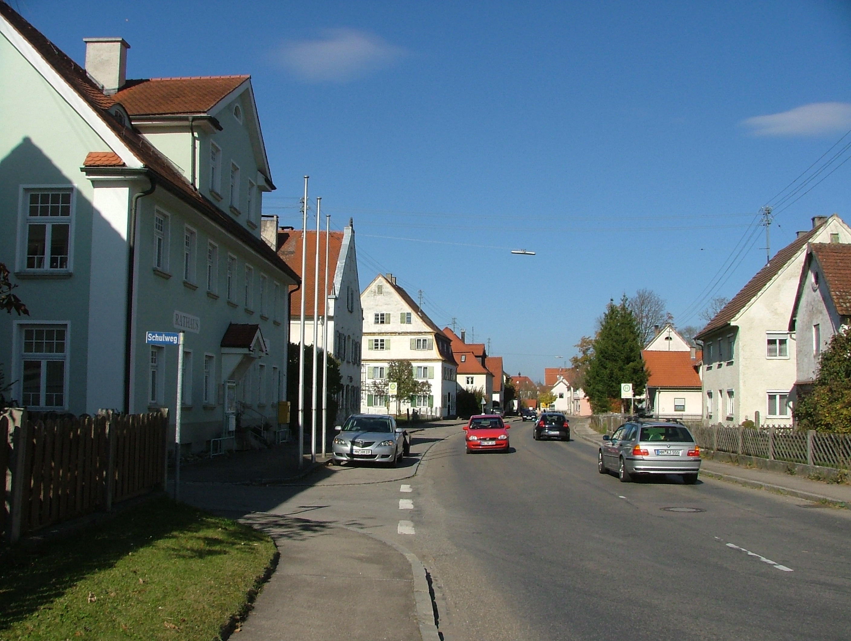 Ulmer Straße - Linke ehemalige jüdische Schule heute Rathaus